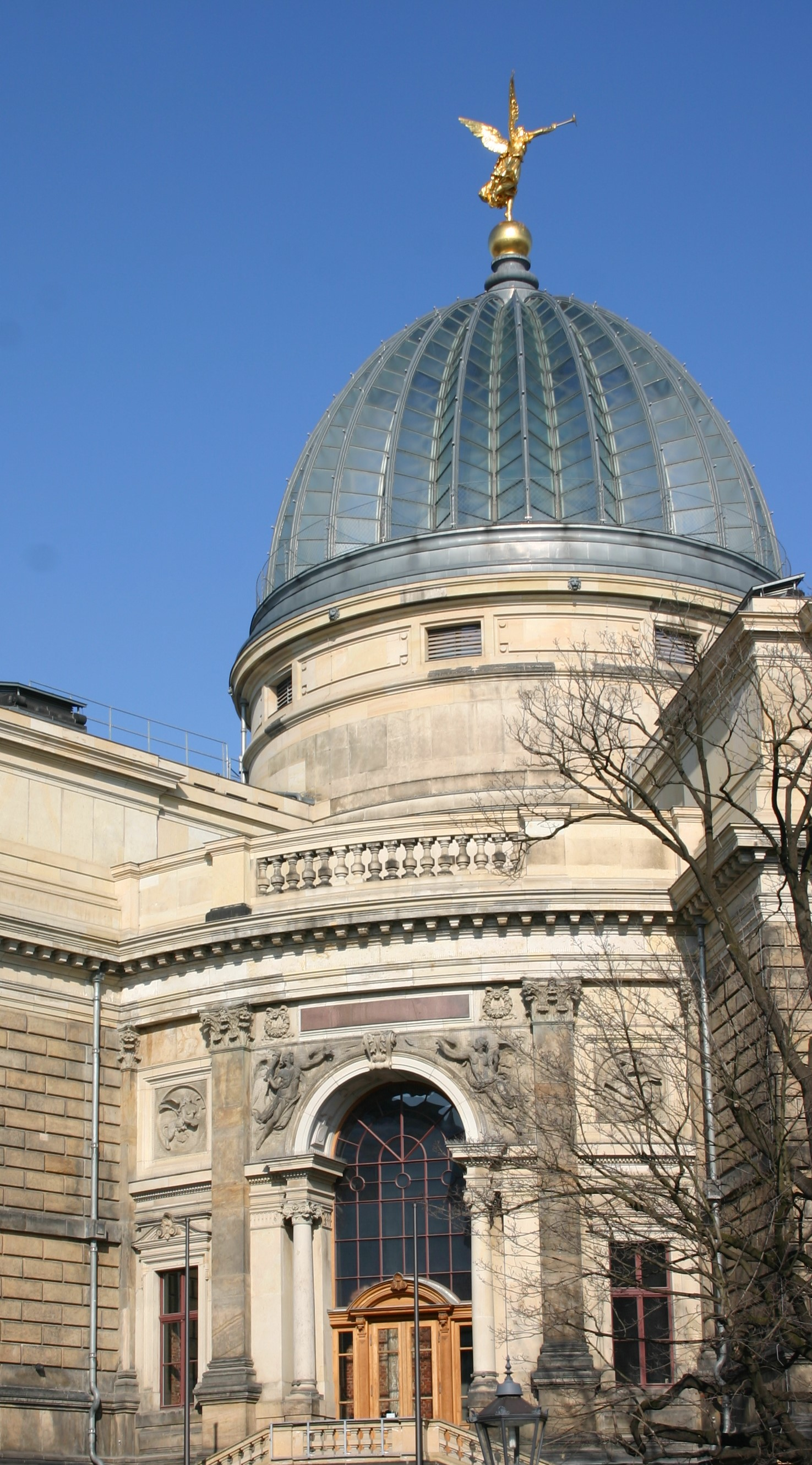 Haupteingang der Kunstakademie in Dresden mit der markanten Glaskuppel, die im Volksmund als Zitronenpresse bezeichnet wird.